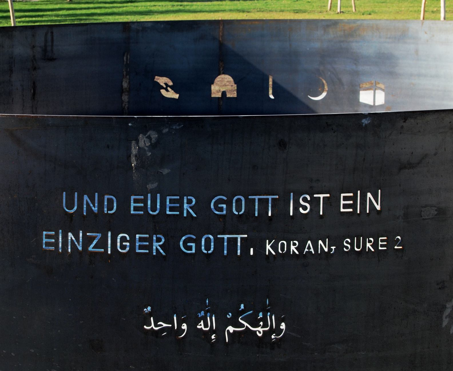 Koran-Sure 2, Āya 163, im Karlsruher Garten der Religionen UND EUER GOTT IST EIN EINZIGER GOTT وَإِلَٰهُكُمۡ إِلَٰهٌۭ وَٰحِدٌۭۖ